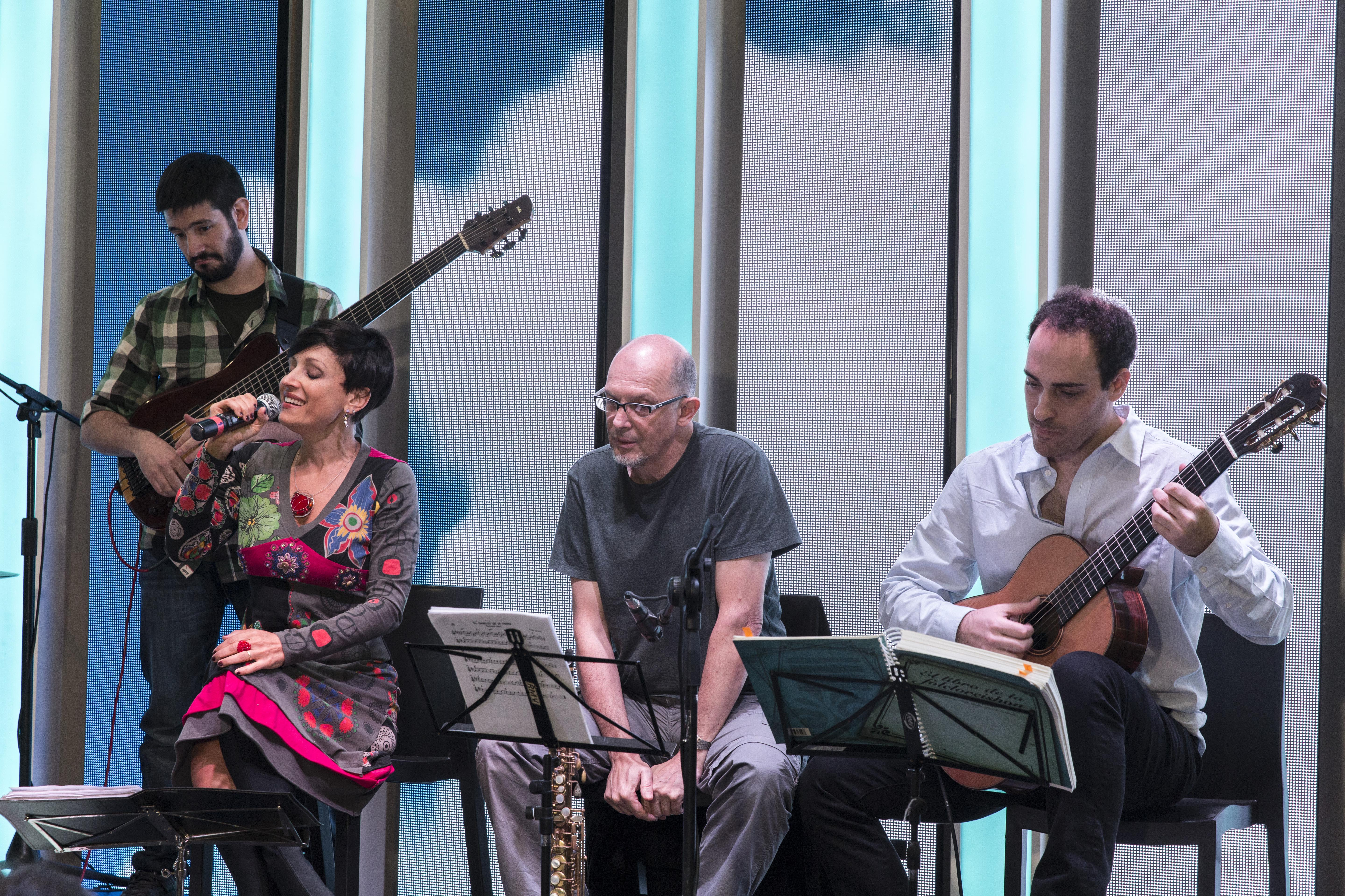 En el marco de la 41.ª Feria Internacional del Libro de Buenos Aires, en el stand del Ministerio de Cultura de la Nación, el director de Cultura de la Biblioteca Nacional, Ezequiel Grimson, presentó el libro Folcloréishon. Los músicos Lorena Astudillo, Federico Beilinson, Pablo Gindre y Joaquín Zaidman interpretaron canciones del libro.